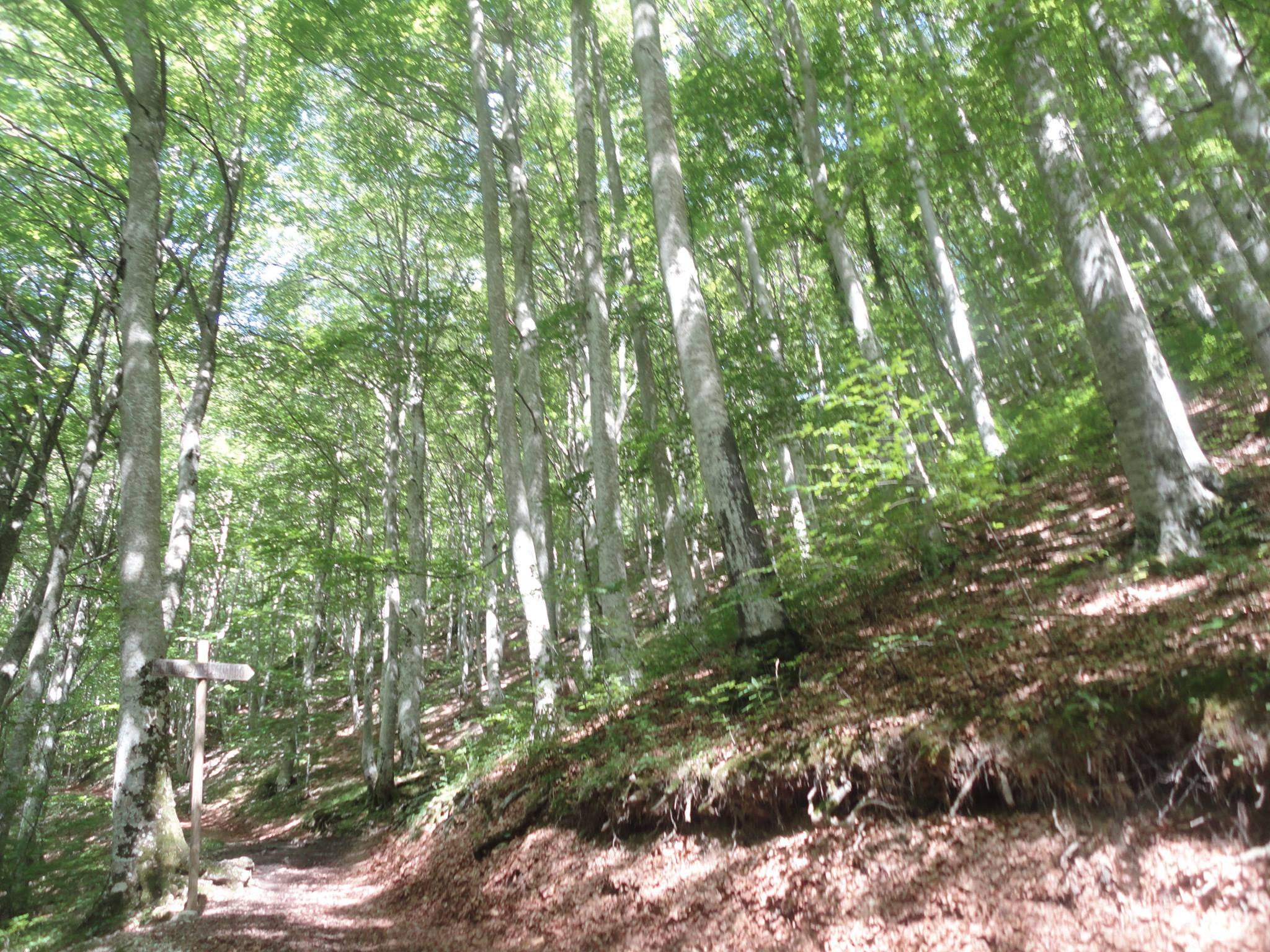 Faggeta dell'Infernaccio nei pressi del bivio dell'eremo di San Leonardo